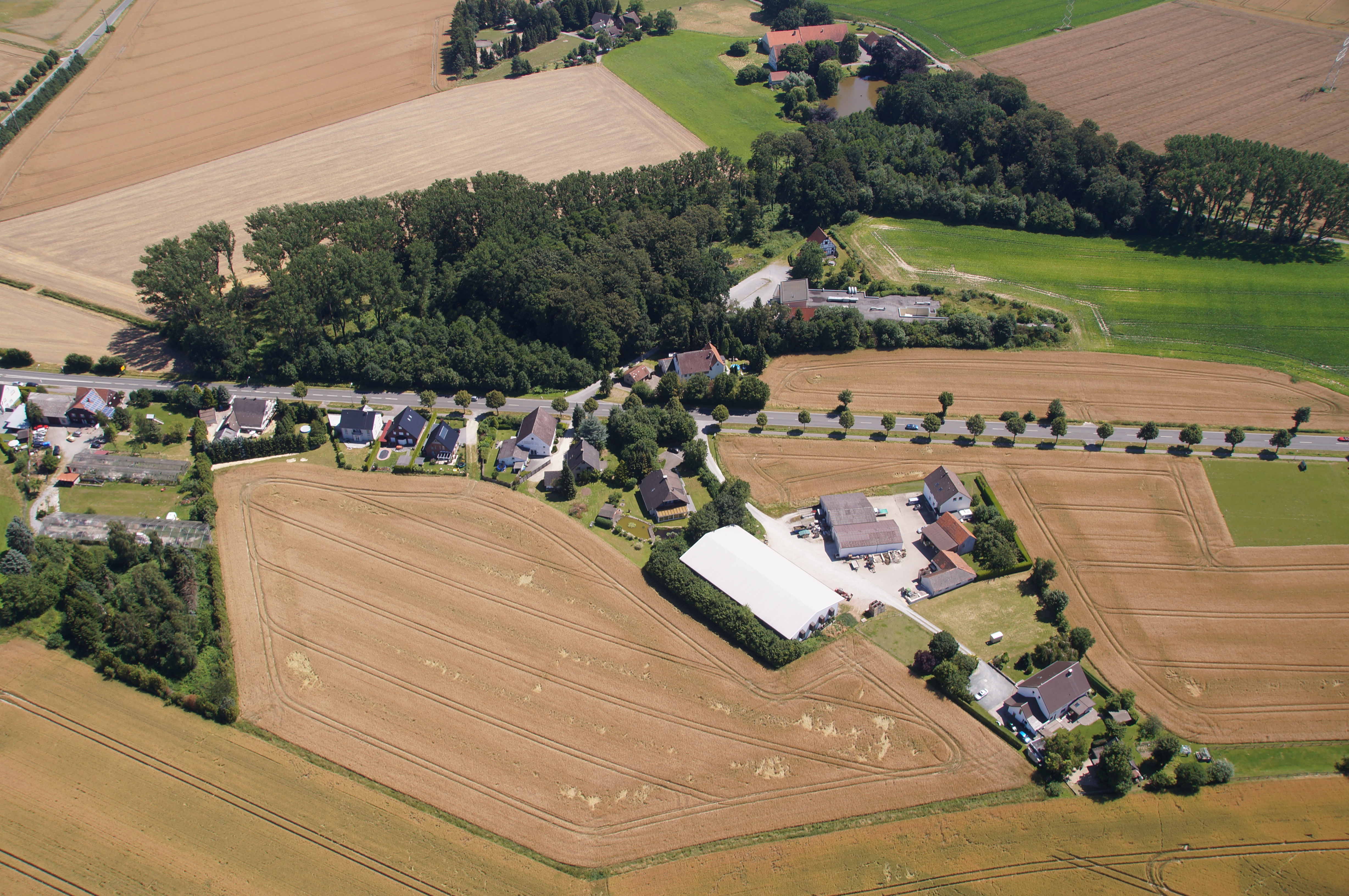 L751 in Krentrup, am oberen Rand der Meierhof, die Keimzelle Krentrups